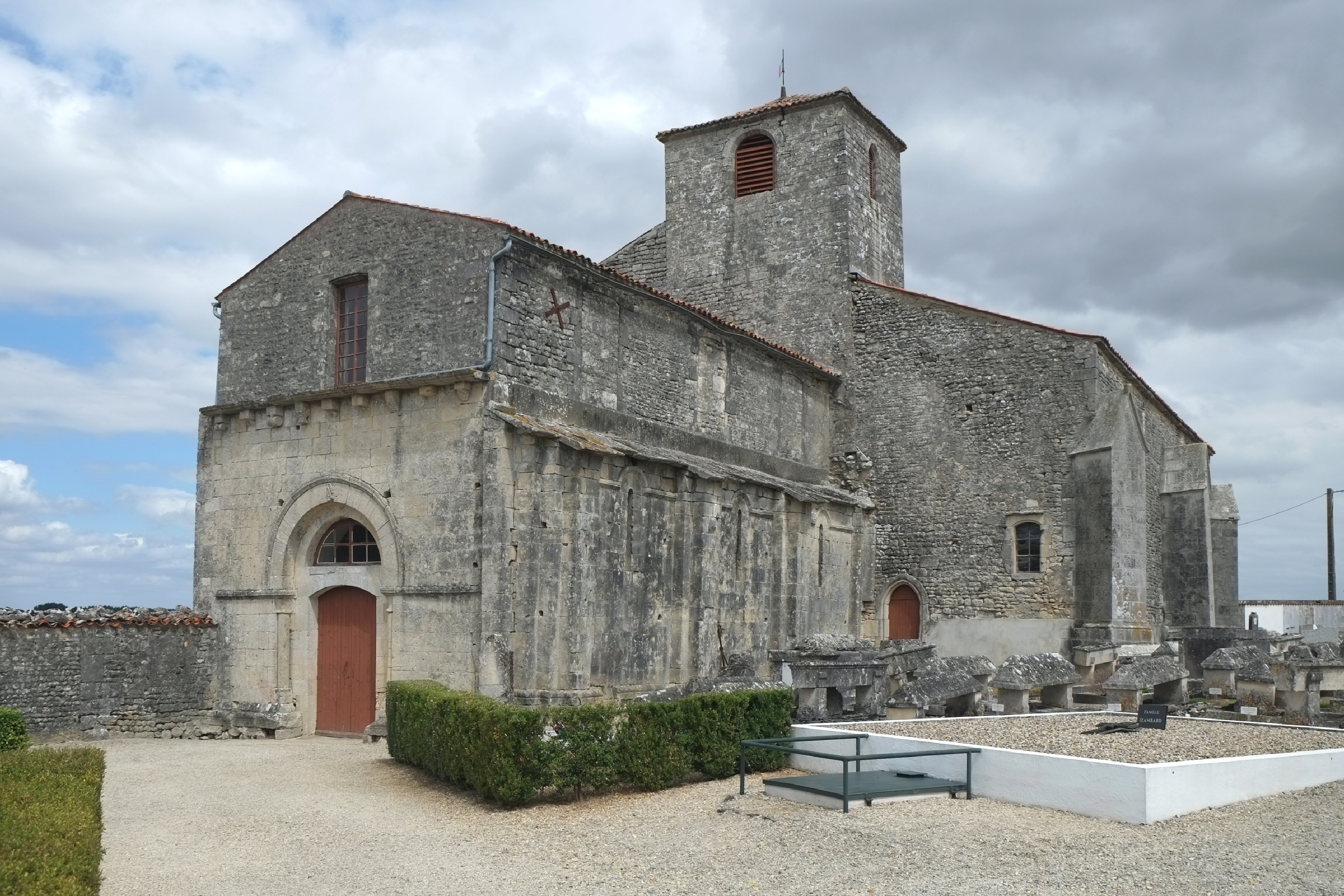 Église Notre-Dame de l'Assomption Les Touches-de-Périgny Charente-Maritime France